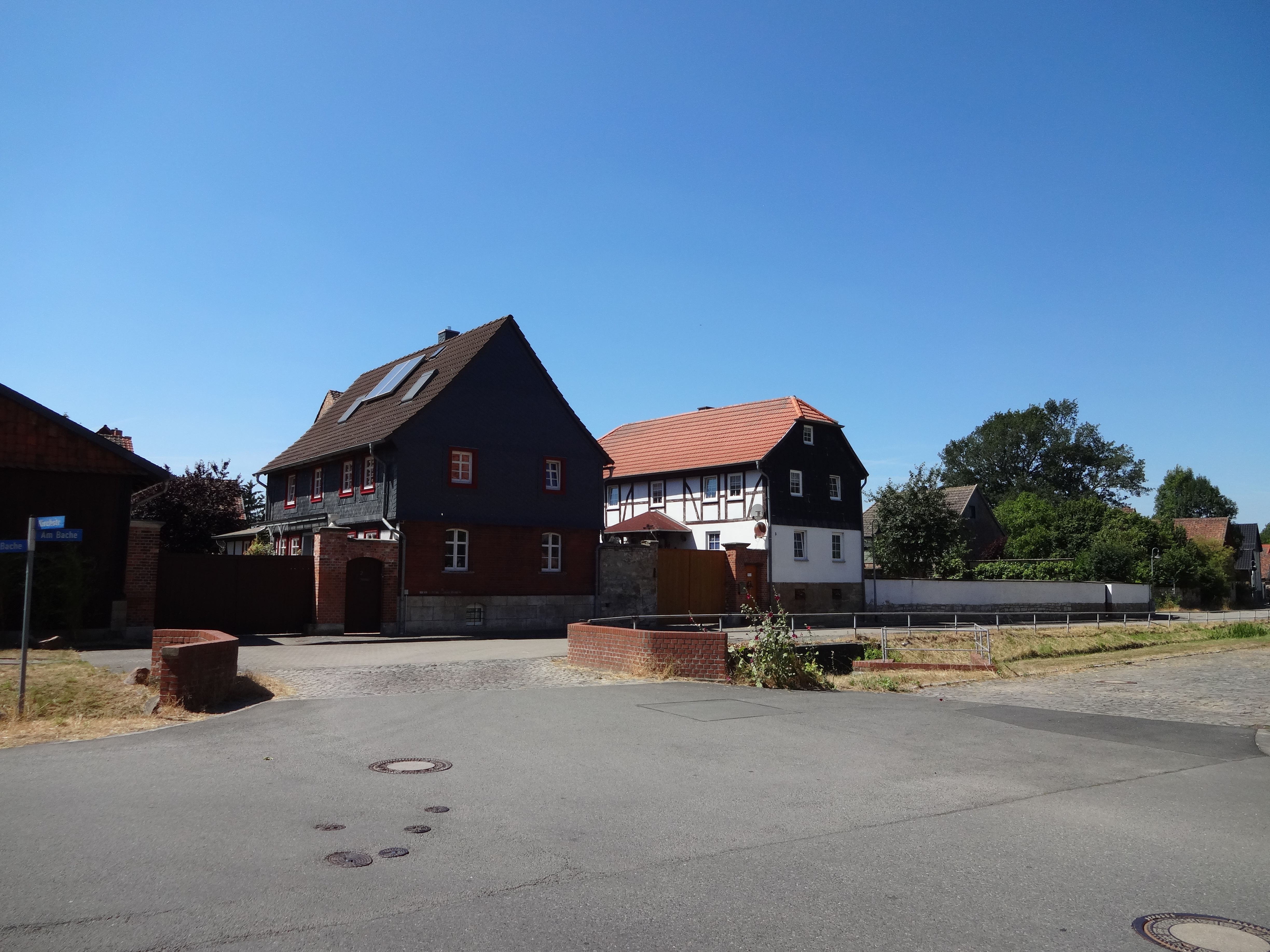 denkmalgeschützte Bauernhäuser Am Bache 2 und 3 in Dedeleben.